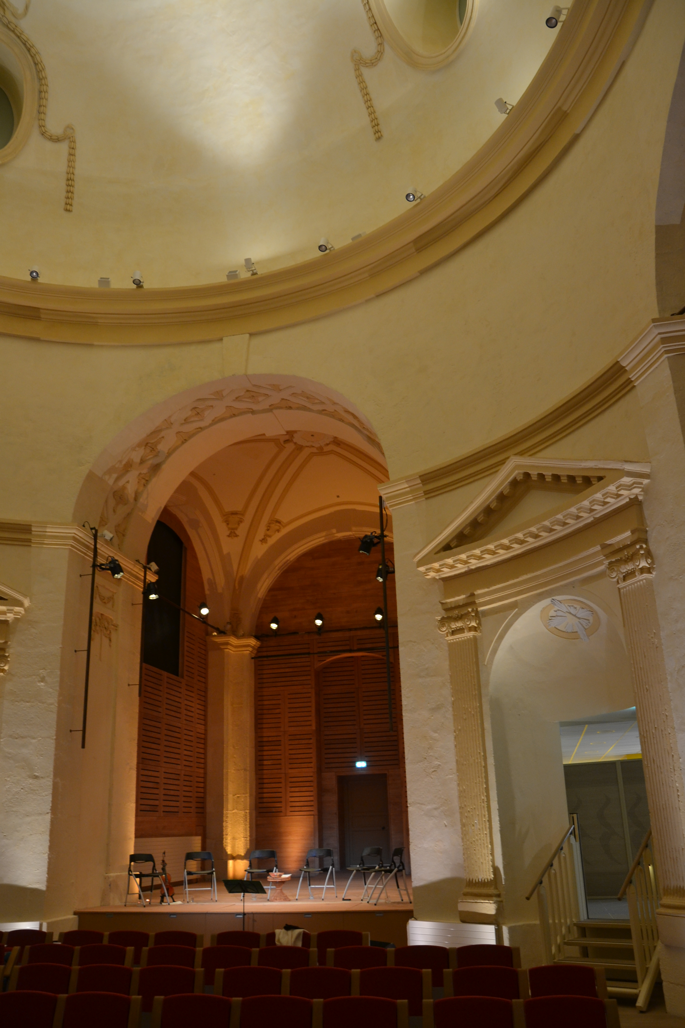 Intérieur de l'ancienne chapelle de la Visitation de Limoges (Haute-Vienne, France).